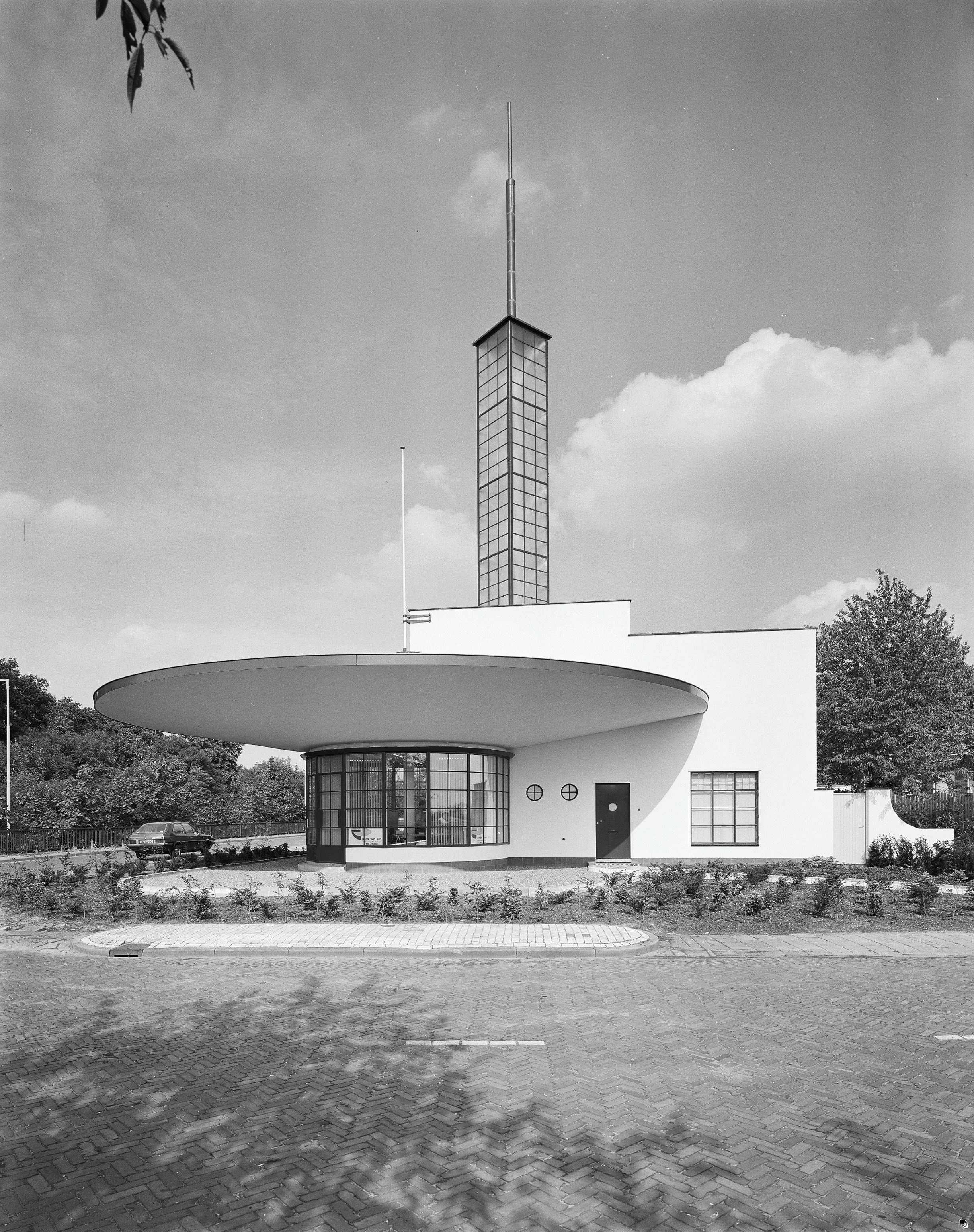 Benzinestation met garagebedrijf: Exterieur OVERZICHT